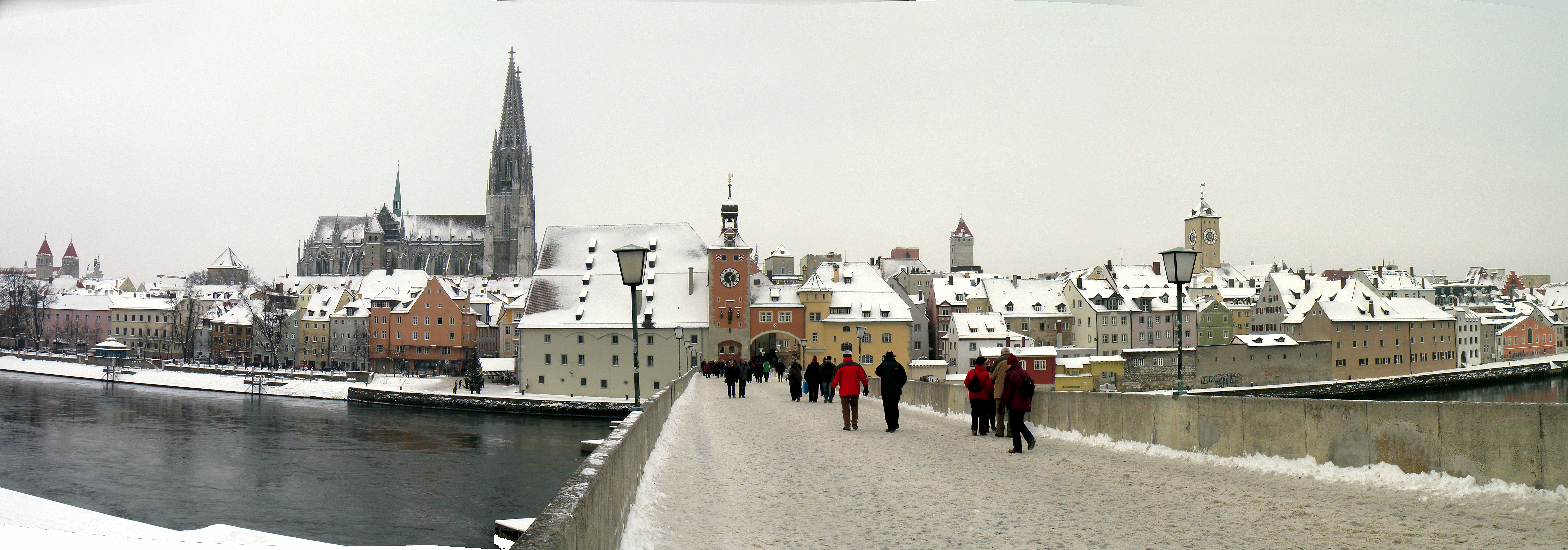 Регенсбург.Вид с каменного моста.